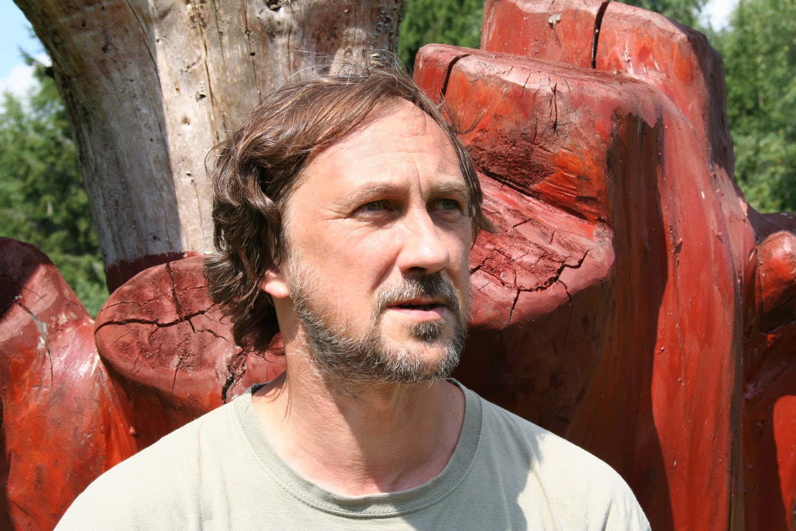 Janika Kronberg Lilli külas Nava talus Tartu NAK-i järjekordsel suveseminaril Lätete Pääl.